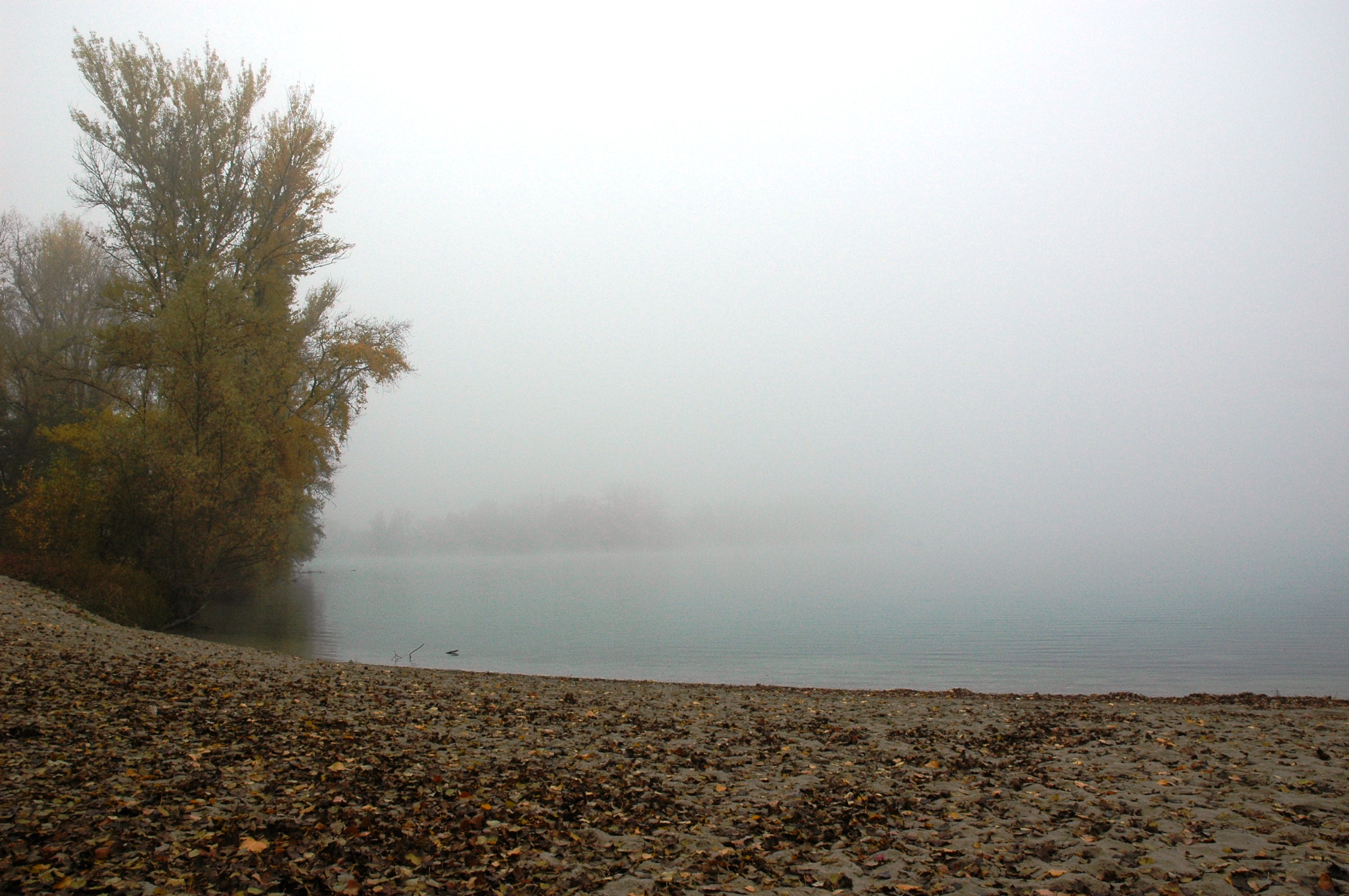 Silbersee (Roxheim)